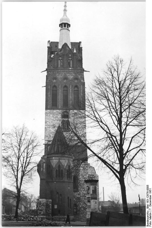 Illus Martin 7.12.51 Kirchen im demokratischen Sektor. Auf Einladung der Landesleitung der evangelischen Kirche Berlin-Brandenburg wurde am 7.12.51 eine Pressebesichtigungsfahrt veranstaltet, um die Kirchen im demokratischen Sektor zu besichtigen. An der Fahrt nahmen auch Pressevertreter aus Westberlin und Westdeutschland teil. UBz: Die Bethanienkirche in Weissensee wurde, enttrümmert.